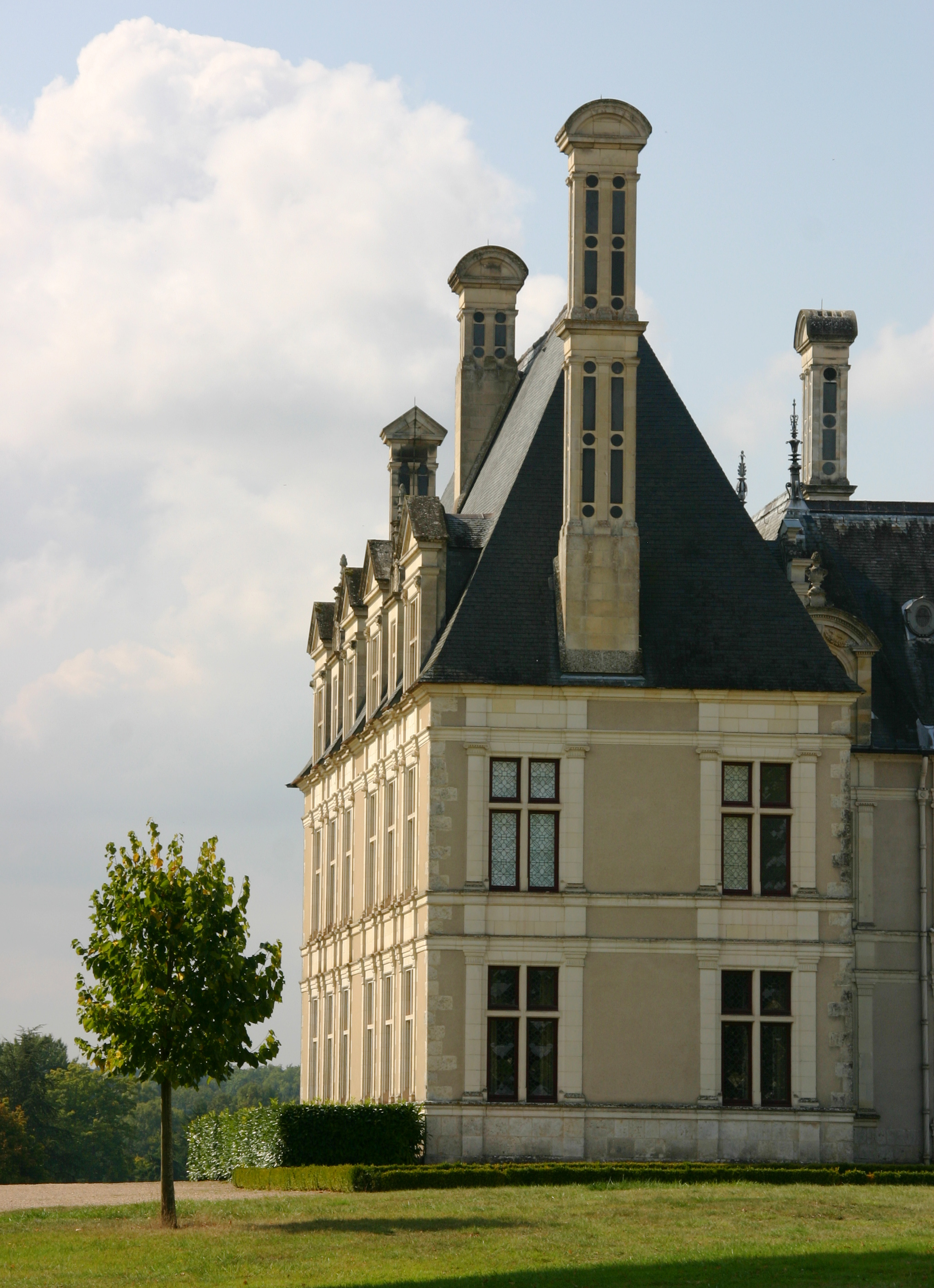 Château de Beauregard